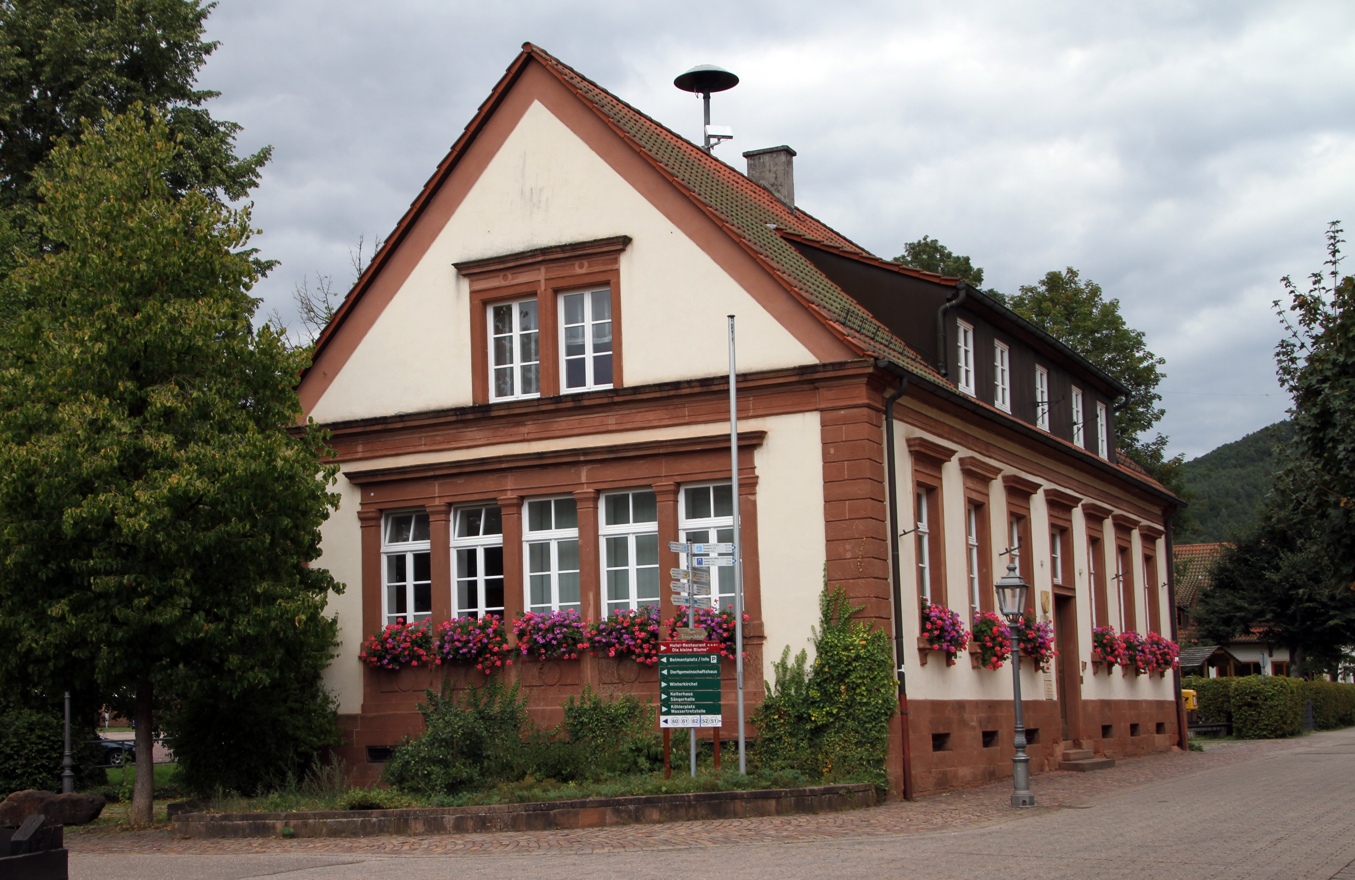 Erfweiler, Winterbergstraße 49; Rathaus; ehemalige Schule; eingeschossiger spätklassizistischer Putzbau, um 1870/80.